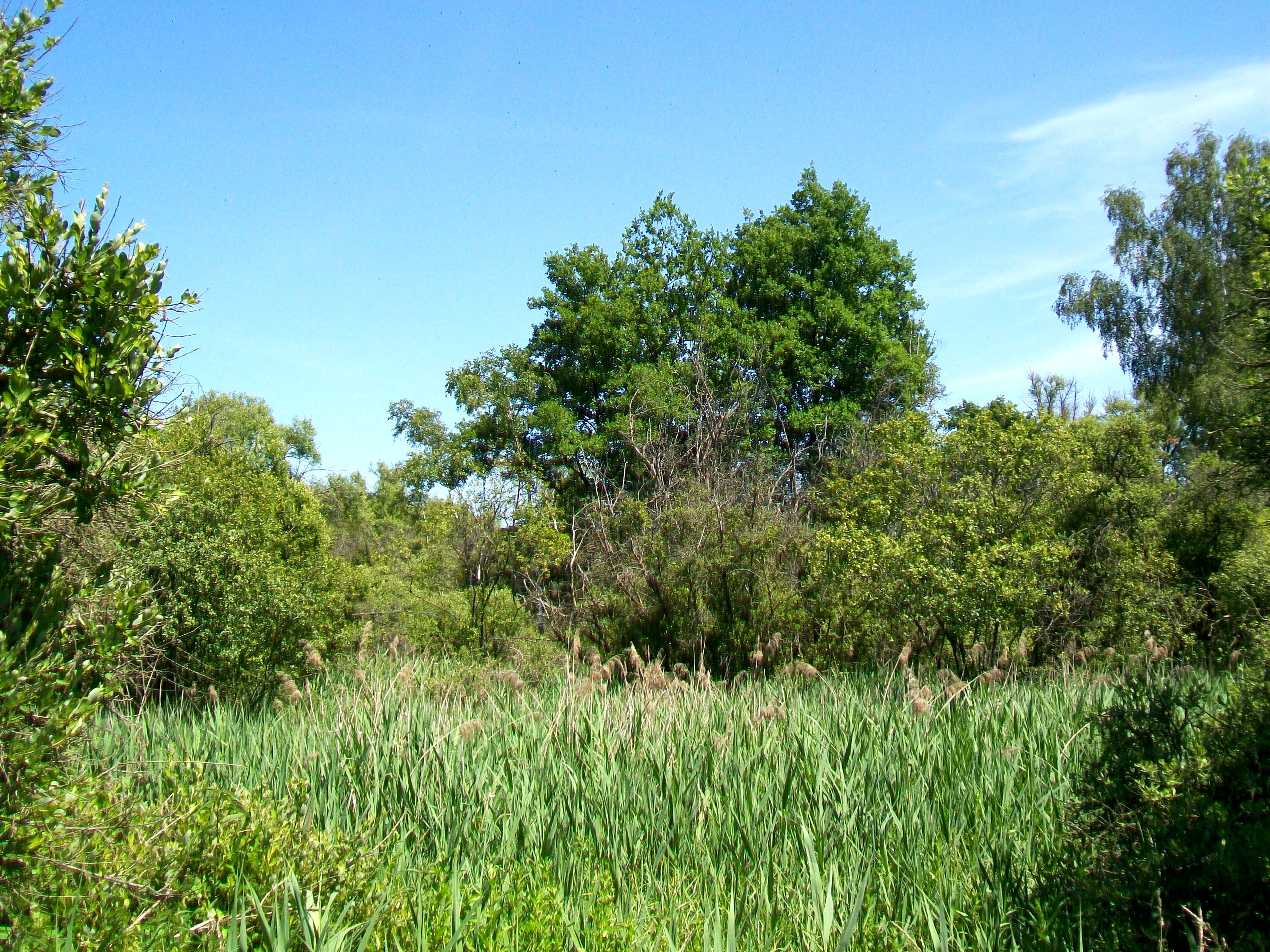 Le marais du Lys, au sud du lotissement des Lys-Chantilly, délimité au sud par la rivière Thève (Nouvelle Thève) qui correspond ici à la limite entre les départements de l'Oise et du Val-d'Oise.